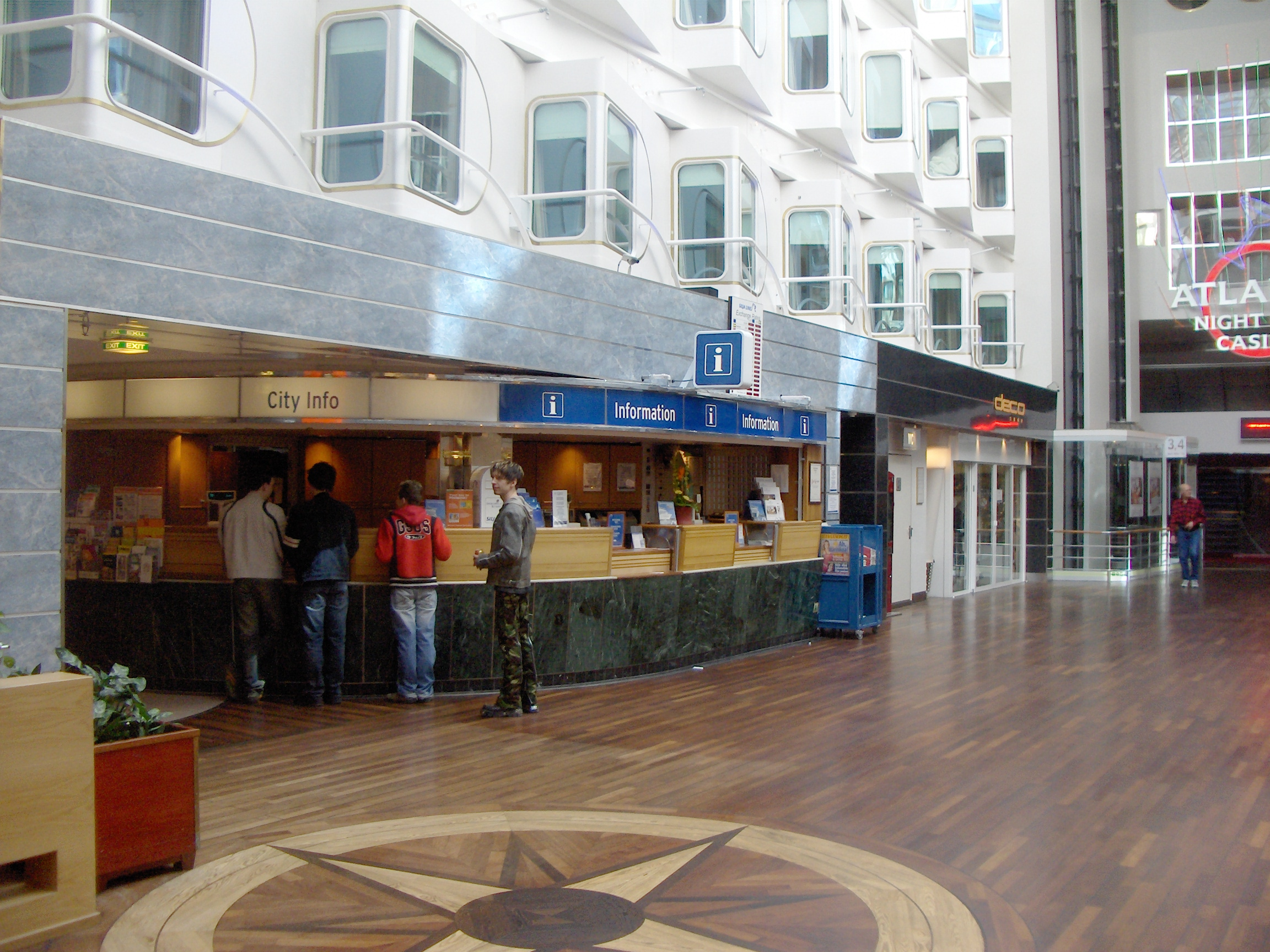 M/S Silja Serenaden informaatiotiski